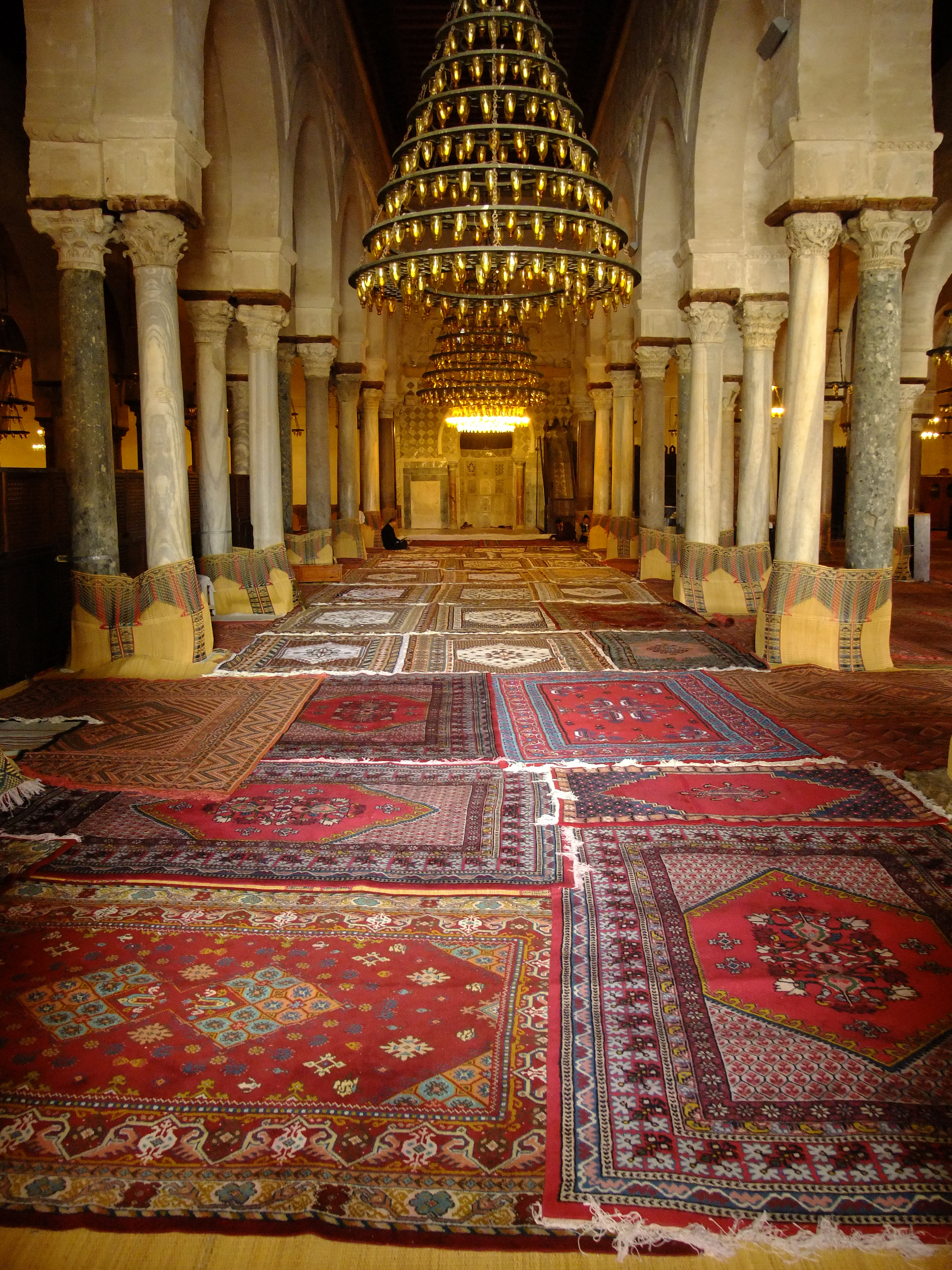 Gebetsraum der Großen Moschee von Kairouan, Tunesien